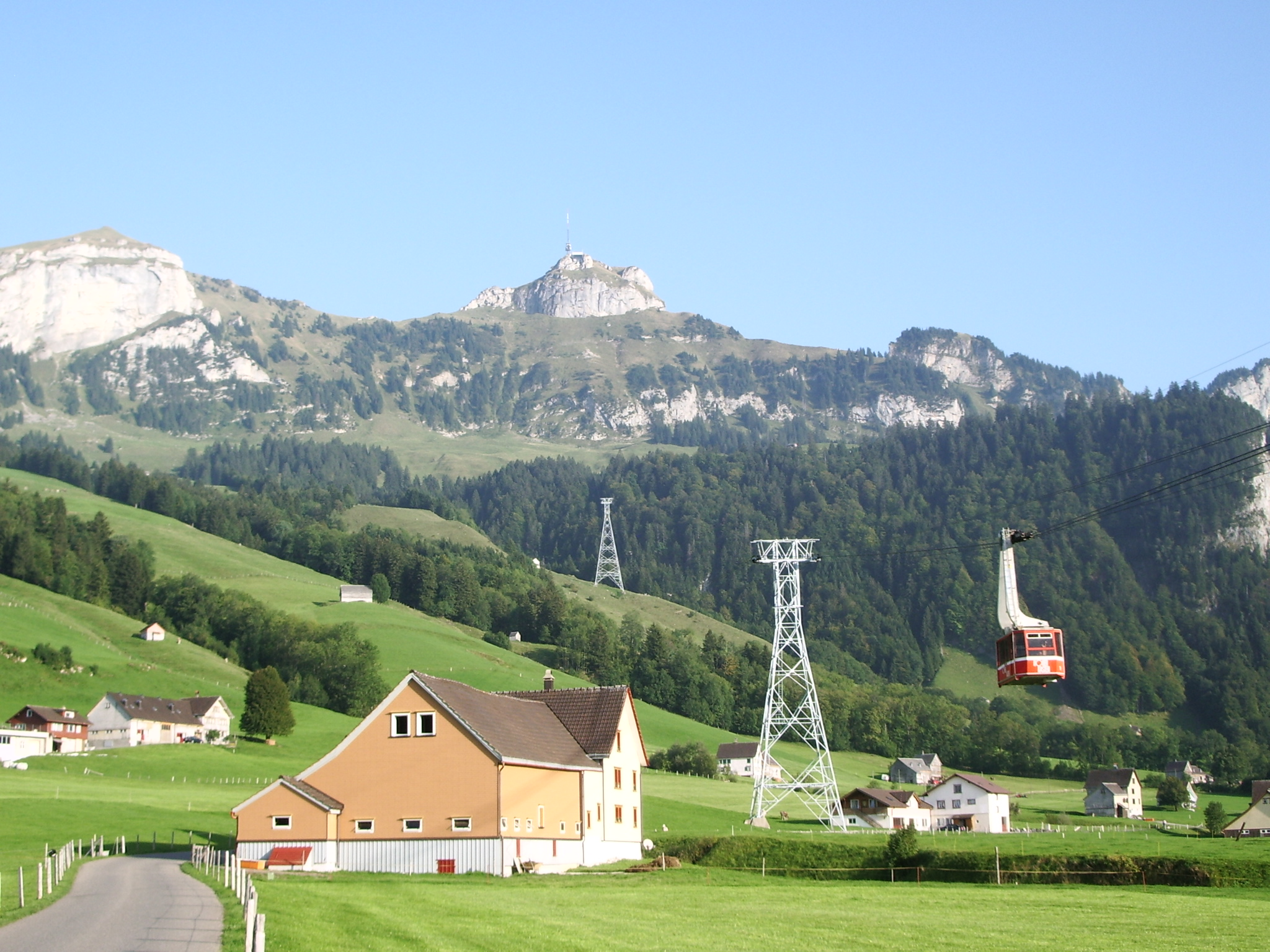 Blick von Brülisau auf Hoher Kasten, Mitte, und Kamor, links. Bild im September 2006 selbst gemacht.